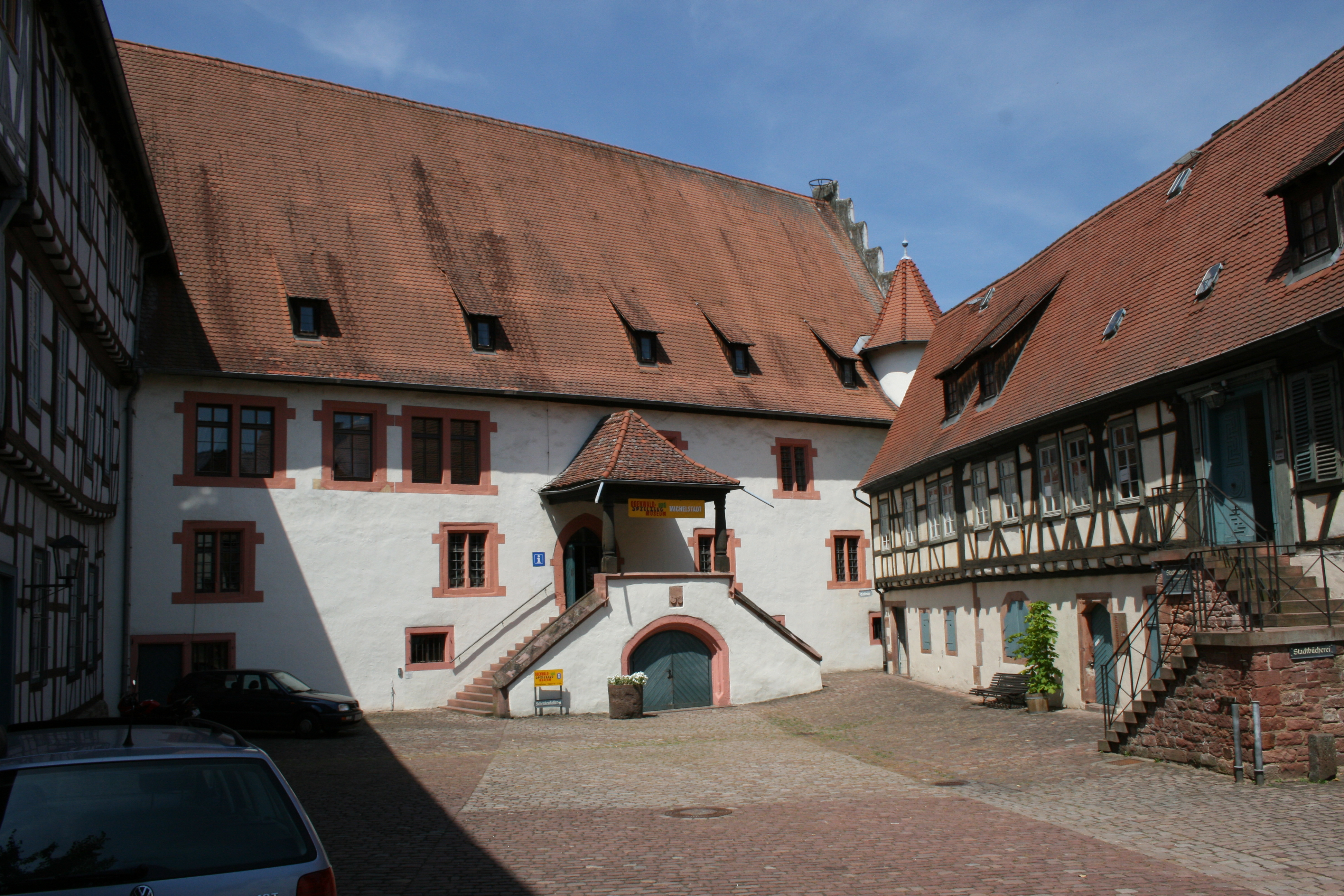 Blick in den Hof der Kellerei in Michelstadt, Eingang zum Odenwald- und Spielzeugmuseum.